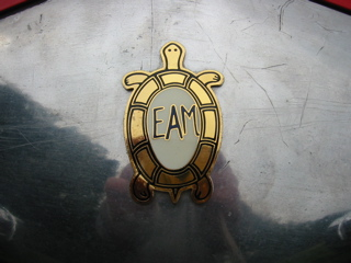 EAM Emblem